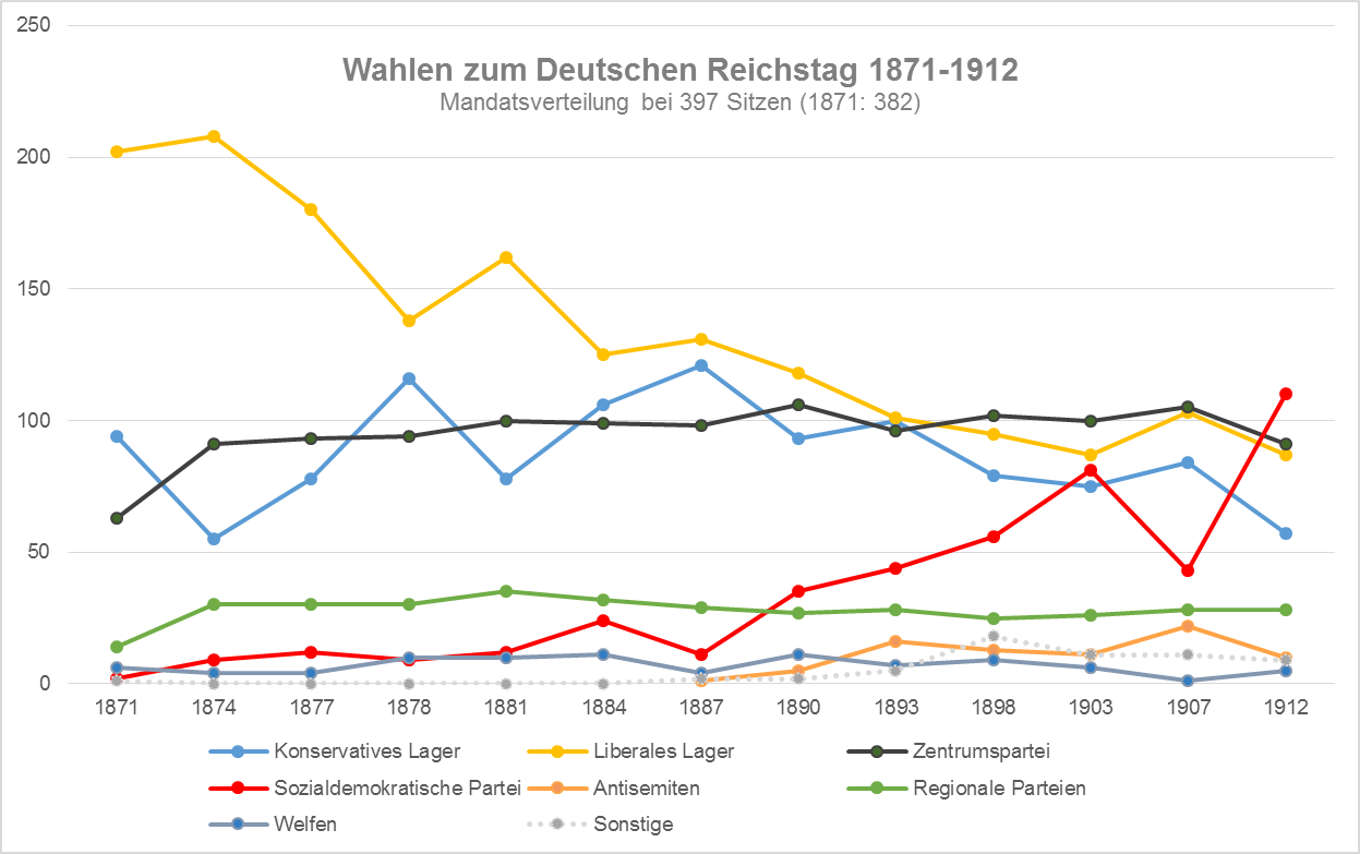 Wahlen zum Deutschen Reichstag 1971-1912 / Übersicht Lager / Mandatsverteilung